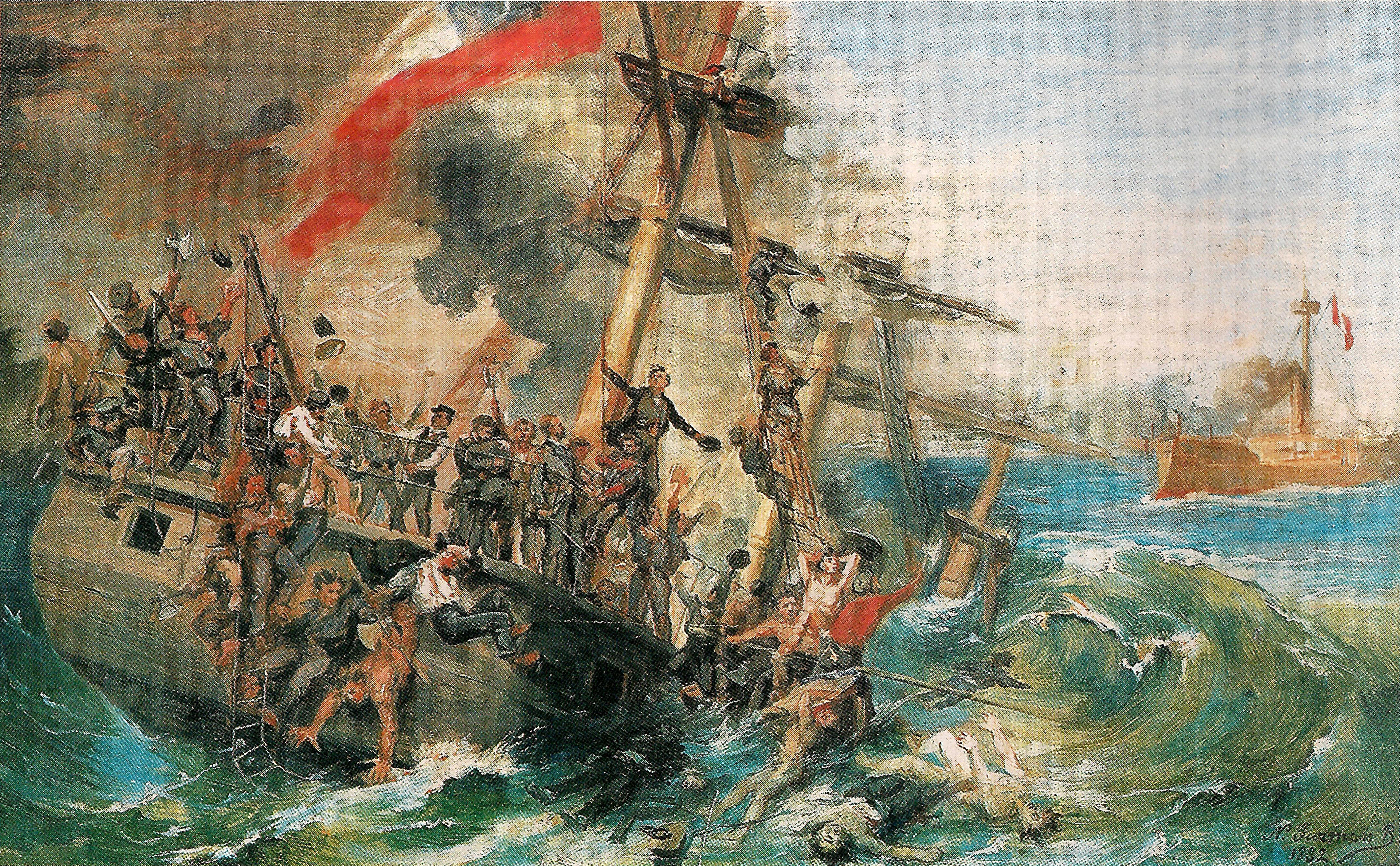 El combate naval de Iquique fue un enfrentamiento naval de la Guerra del Pacífico. Tuvo lugar en la bahía de Iquique, el día miércoles 21 de mayo de 1879. En él se enfrentaron el monitor peruano Huáscar al mando del capitán de navío Miguel Grau Seminario y la corbeta chilena Esmeralda al mando del capitán de fragata Arturo Prat Chacón, quien resultó muerto en esta acción. En Chile se considera únicamente a este enfrentamiento como Combate naval de Iquique y tuvo como resultado el hundimiento de la corbeta chilena y el levantamiento del bloqueo del puerto de Iquique. En el Perú se considera al enfrentamiento hasta Punta Gruesa con un solo nombre llamado Combate de Iquique1 2 incluyendo el enfrentamiento entre la fragata peruana Independencia y la goleta chilena Covadonga y tuvo como resultado el encallamiento de la Independencia en unos roqueríos.